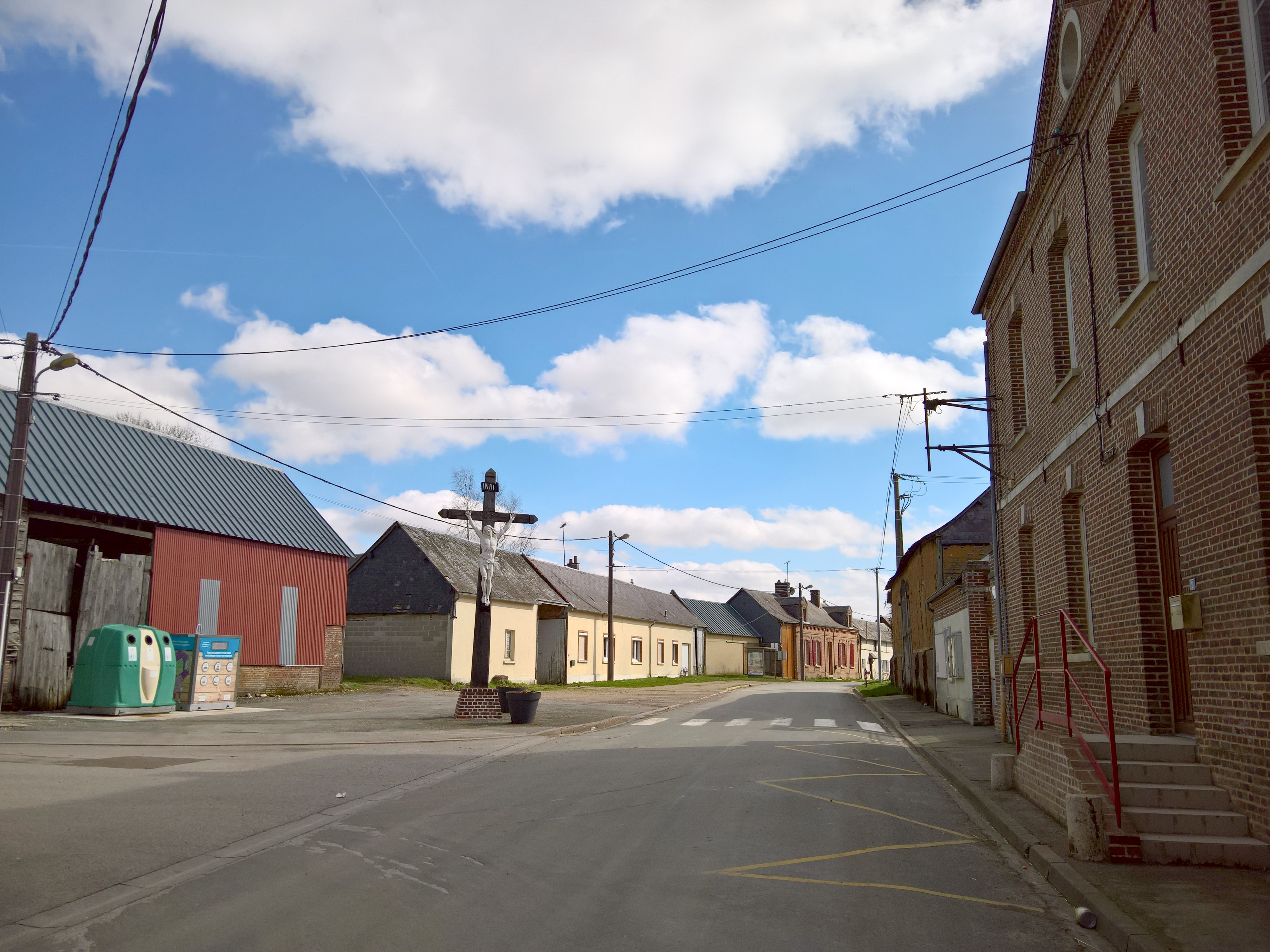 Daméraucourt - La rue de Grandvilliers devant l'école. L'un des calvaires.